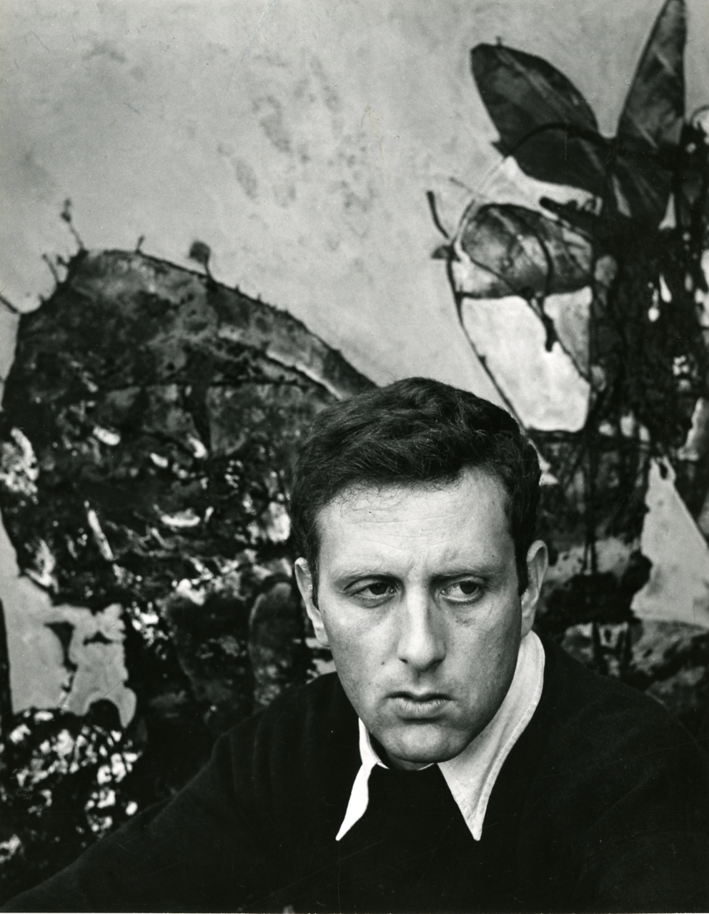 Servizio fotografico : Milano, 1968 / Paolo Monti. - Stampe: 2 : Positivo b/n, gelatina bromuro d'argento/ carta, 24x30. - ((Al verso delle stampe iscrizioni didascaliche manoscritte a matita; timbri a inchiostro con copyright: "Paolo Monti/ Via V. Colonna [...]/ Milano [...]", "© - Credit to:/ Paolo Monti/ Via T. Tasso [...]/ Milano [...]". - Sul coperchio della scatola iscrizione didascalica manoscritta a pennarello nero: "Ritratti/ Artisti".